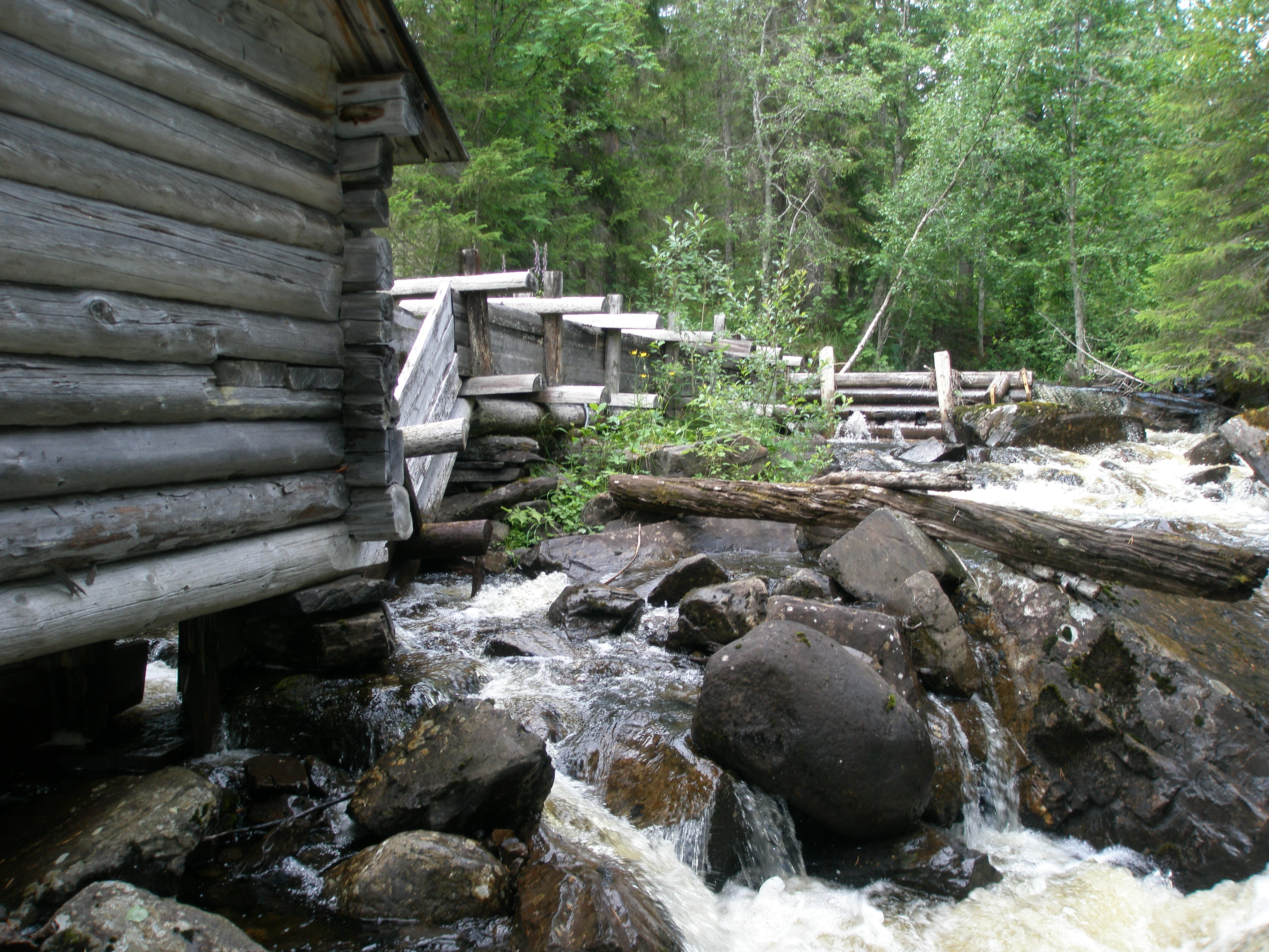 Skvaltkvarn i Brattmons by, Offerdals socken, Krokoms kommun, Jämtland, Sverige.